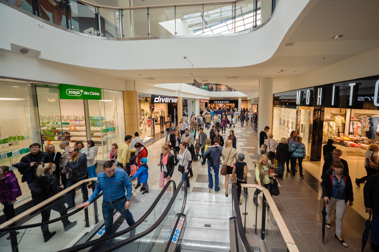 Wnętrze Galerii Neptun w dniu otwarcia - 25 kwietnia 2015 r.